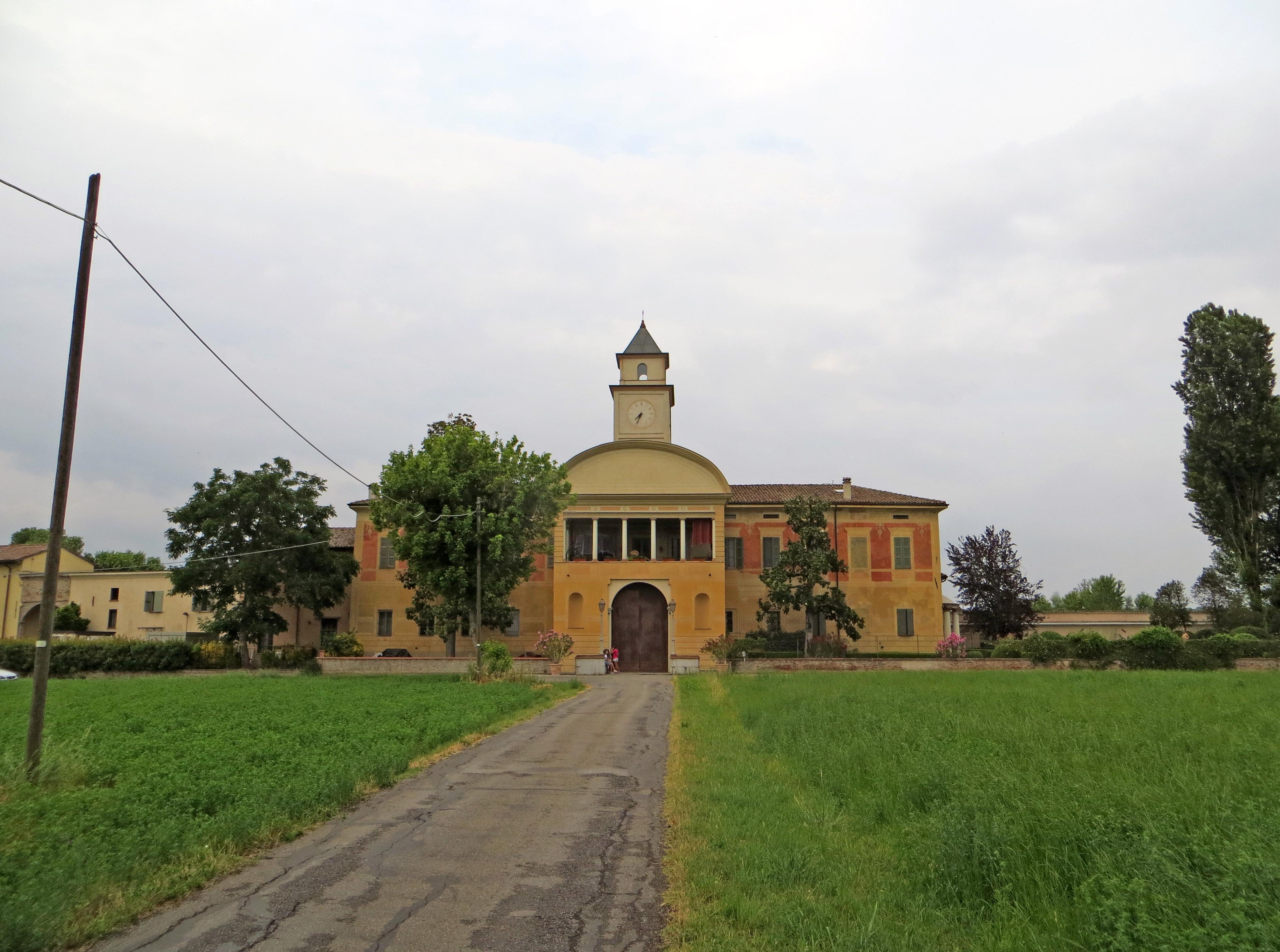 Villa Mattei (San Prospero Parmense, Parma) - facciata